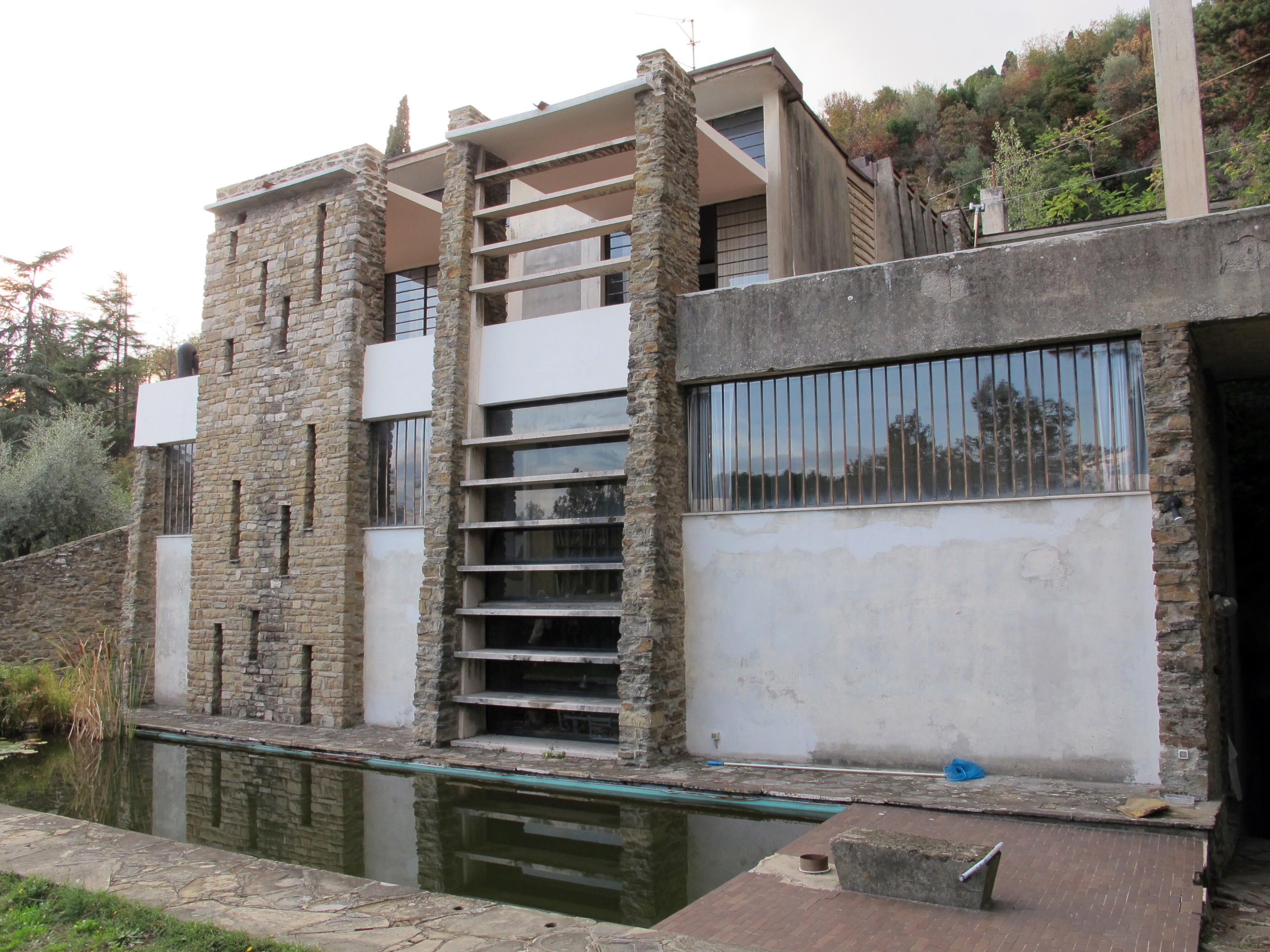 Casa-studio ricci 00.1